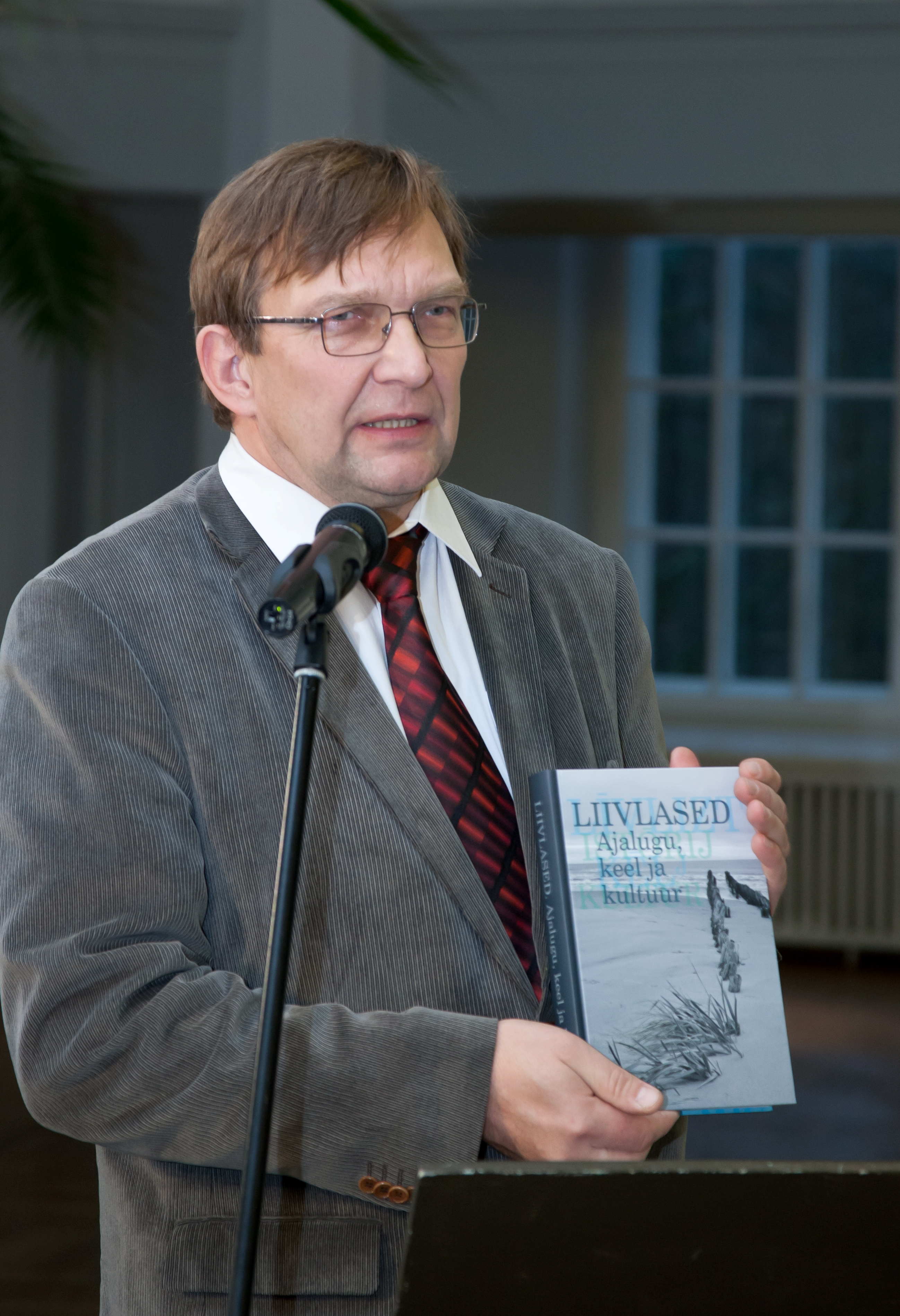 5. novembril 2011 toimus TÜ ajaloo muuseumis konverents "Liivlased. Maa. Rahvas. Ajalugu". Professor Urmas Sutrop esitlemas koguteost "Liivlased. Ajalugu, keel ja kultuur".